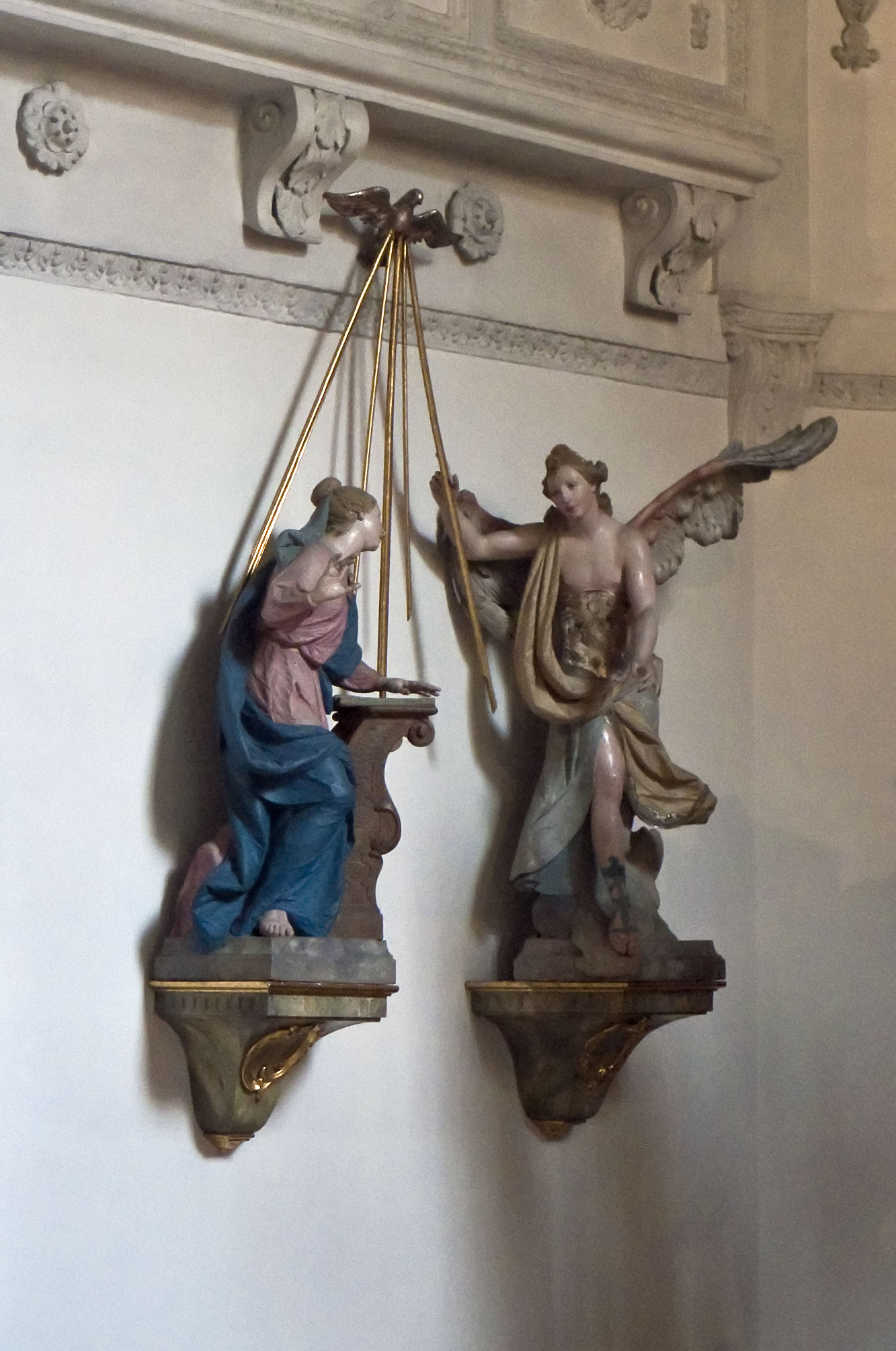 Verkündigung-St.-Sylvester-München